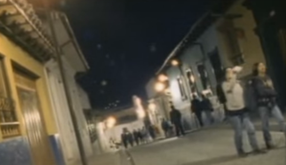 Diastole